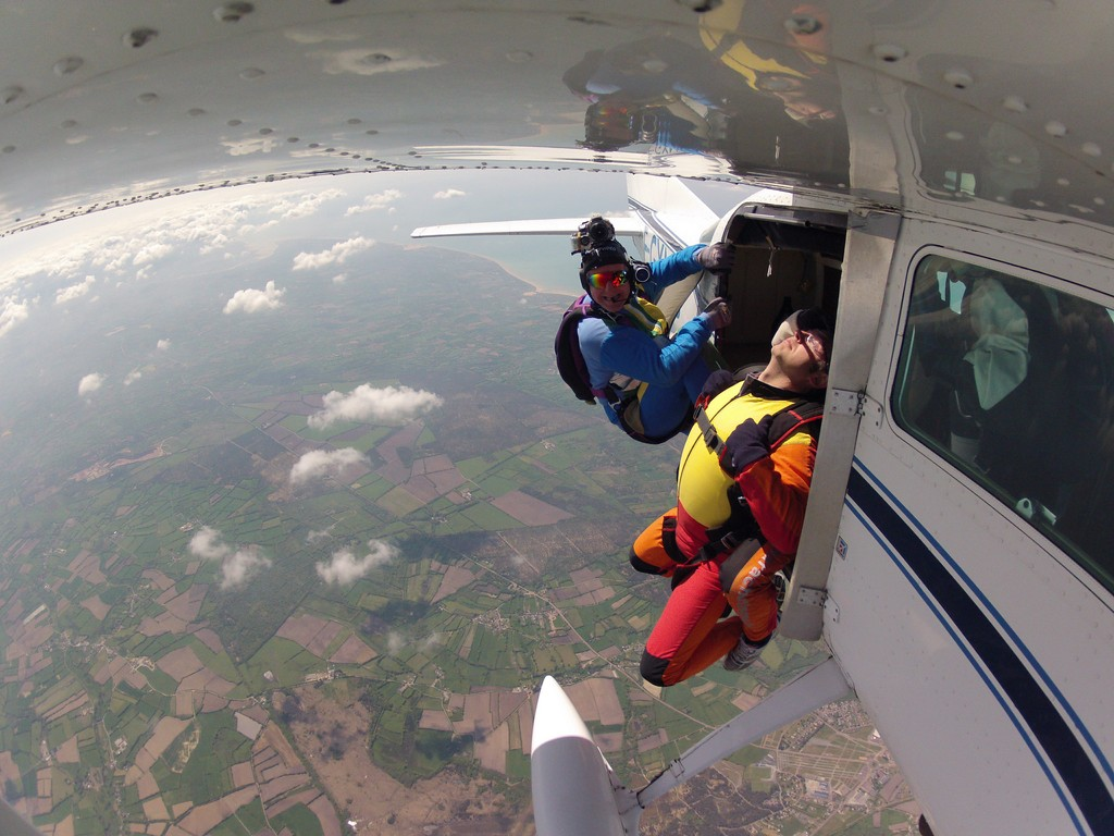 Sortie d'avion saut en parachute avec notre vidéo-man sur notre école de parachutisme.